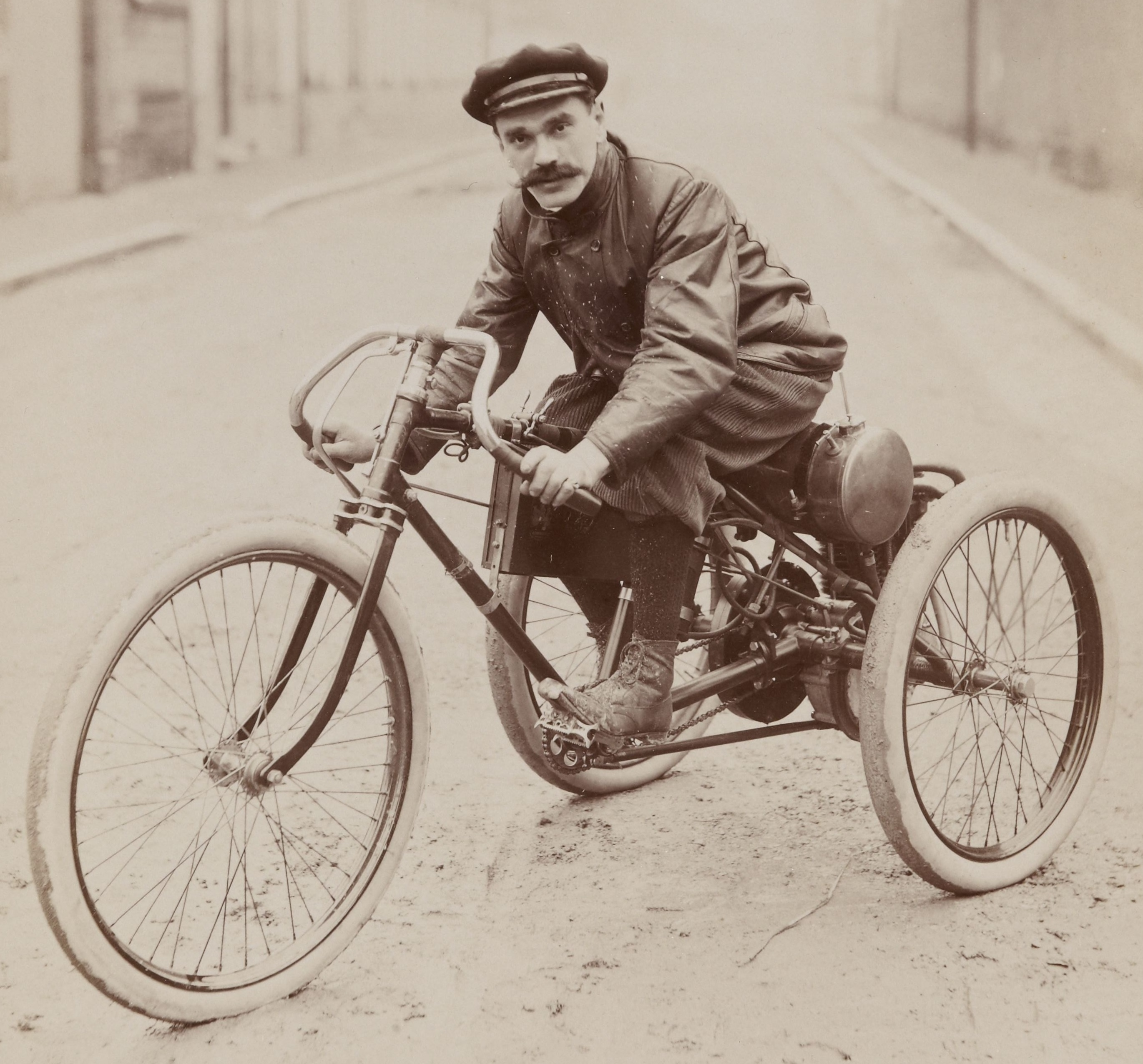 [Collection Jules Beau. Photographie sportive] : T. 11. Années 1898, 1899 et 1900 / Jules Beau : F. 29v. Béconnais